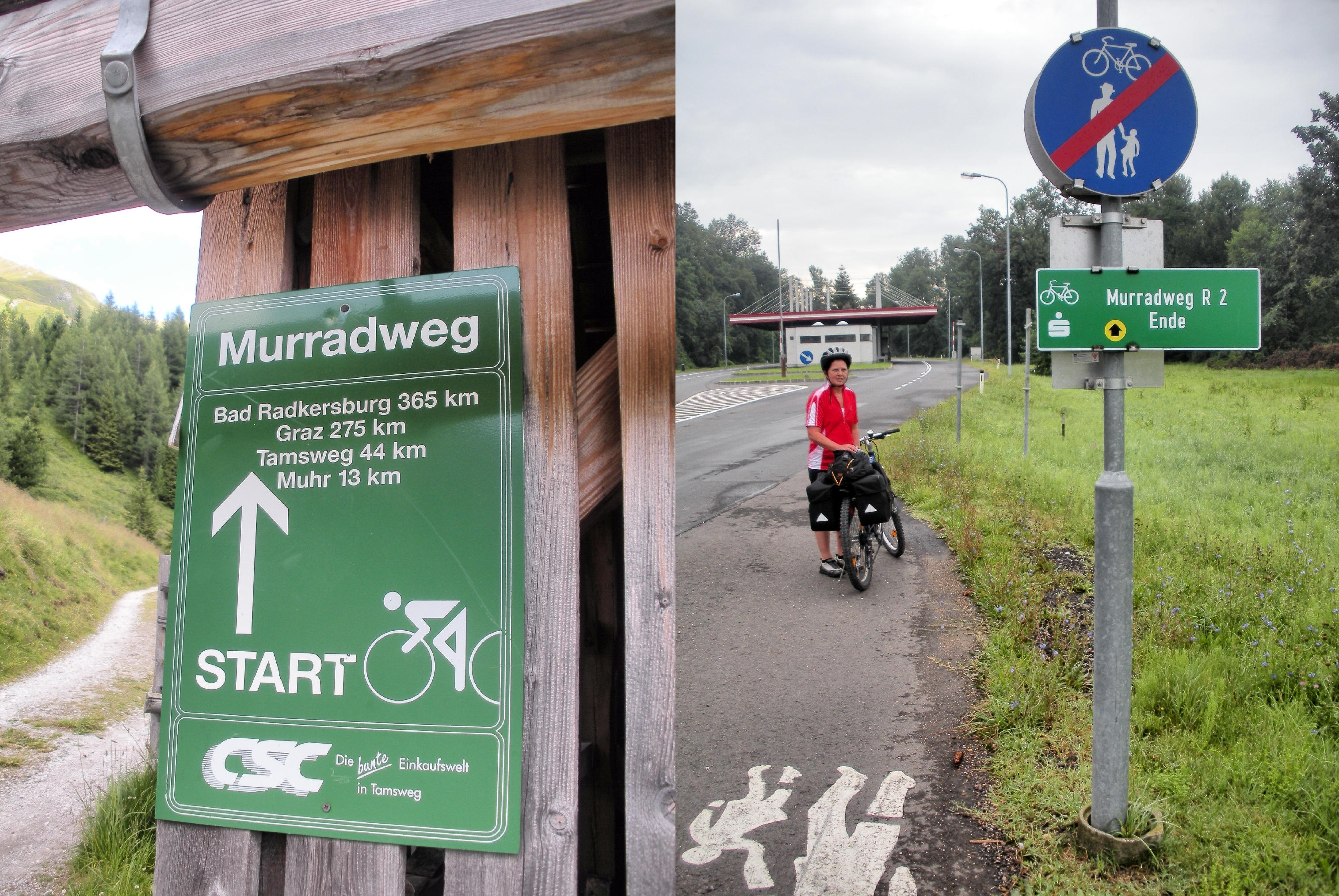 Start des österreichischen Murradwegs bei der Sticklerhütte im salzburgischen Lungau und dem seinerzeitigen Ende desselben kurz vor dem Grenzübergang von Österreich nach Slowenien bei Sicheldorf in der Steiermark